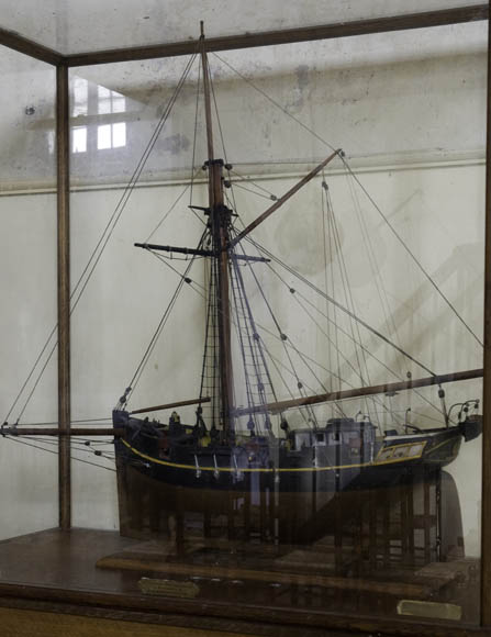 Ex voto dit "de Bonne Aimée", Eglise Sainte Catherine, Saint-Sixte, Lot et Garonne